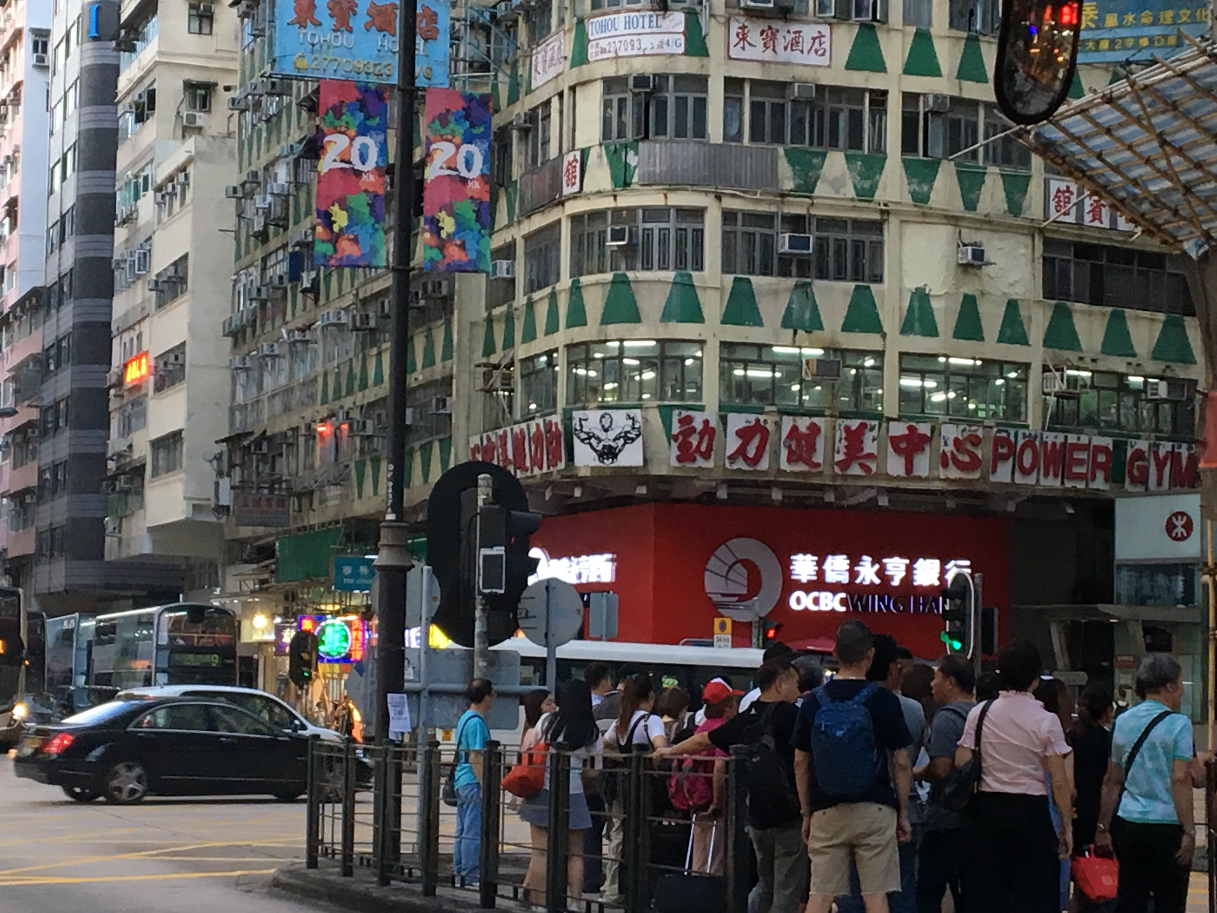 中文（香港）: 勁力健美中心